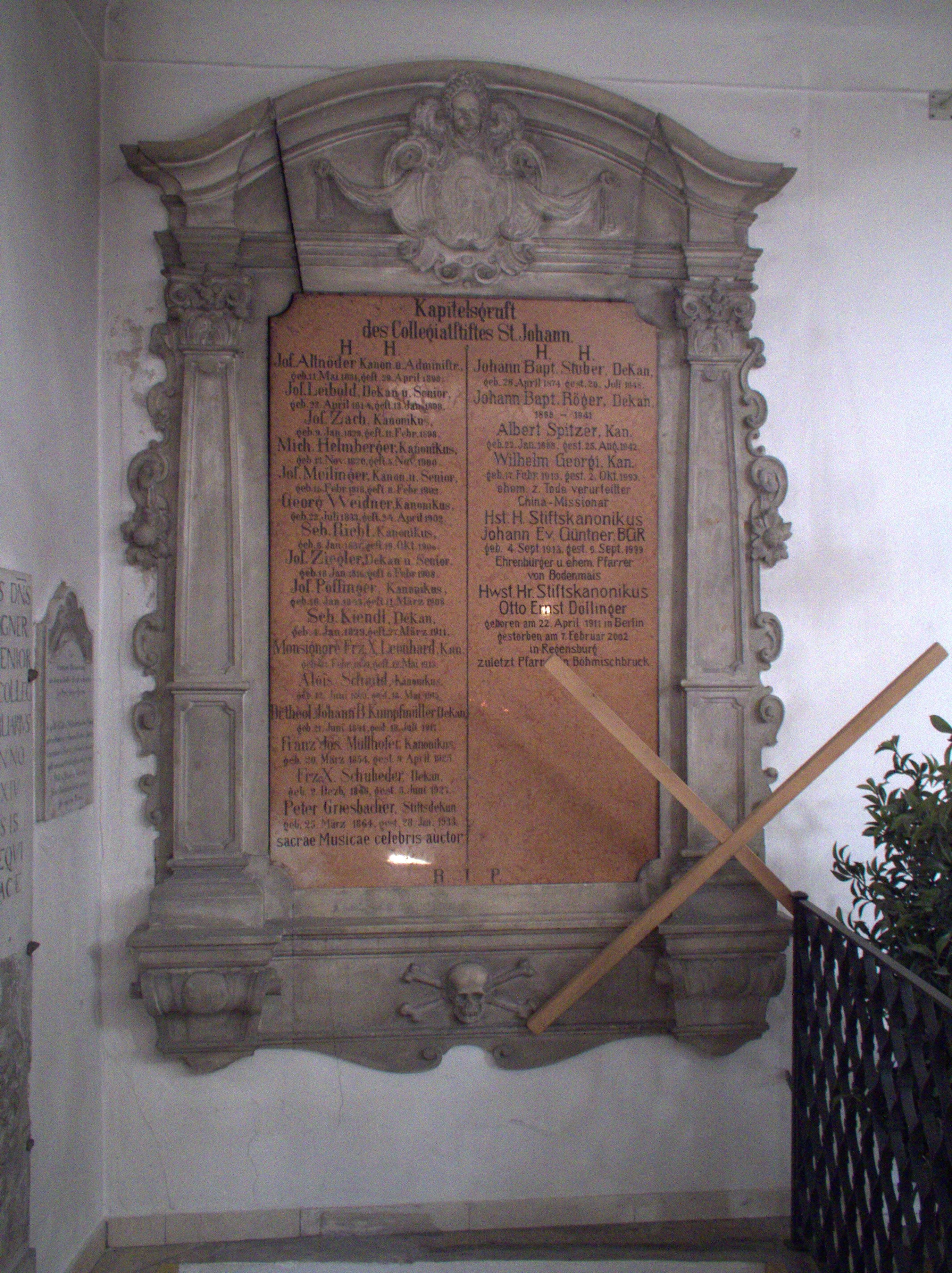 Stiftskirche St Johann in Regensburg am Krauterermarkt 5